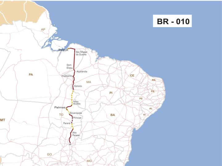 Mapa descritivo da BR-010 em relação as outras rodovias brasileiras.